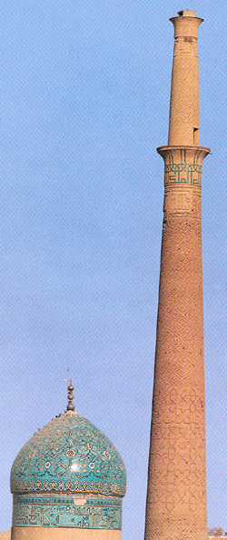 Minaret d'époque Seldjoukide à Esfahan. Scanné d'une photo de par lui-même. Image originale récupérée sur la WP anglaise Image:Seljuk-isfahan.jpg